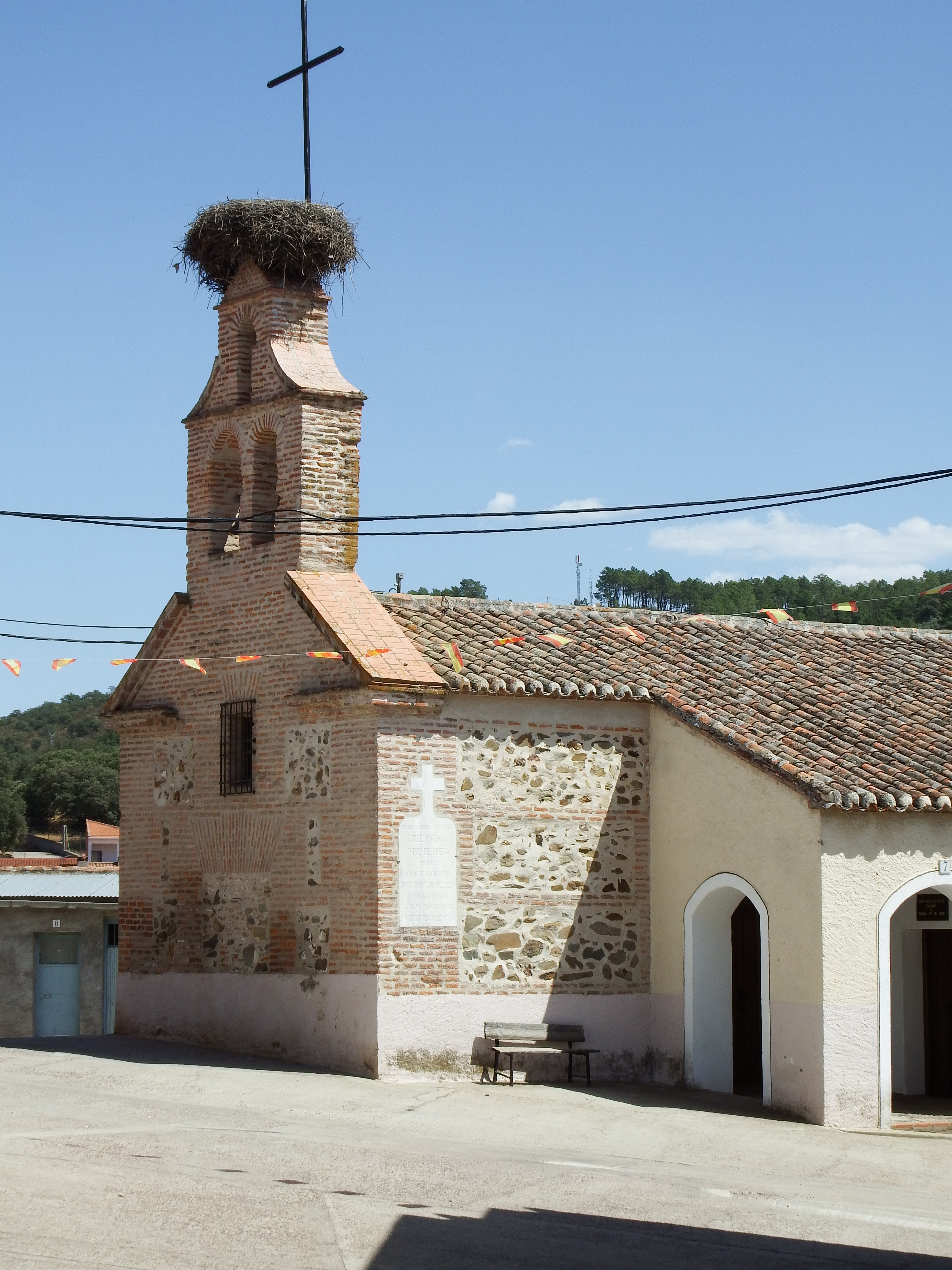 Anchuras